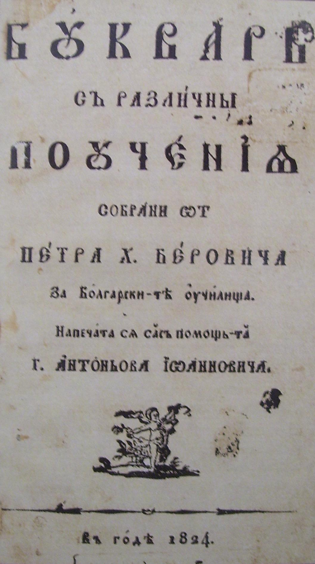 Корица на Рибния буквар.